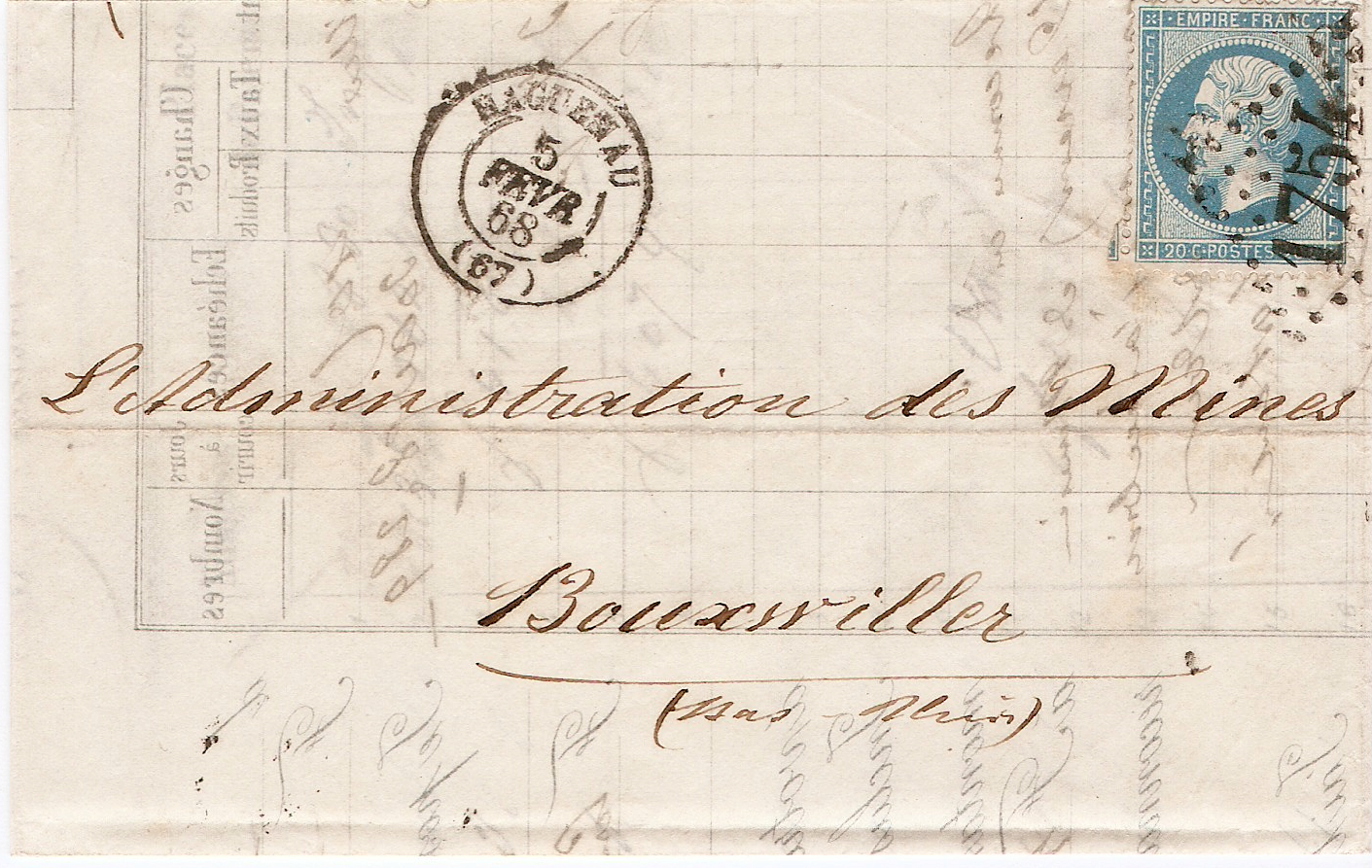 Lettre France Haguenau 1868, affranchie avec un 20c bleu de 1862 (Napoléon 3) et oblitérée avec un cachet gros chiffre 1754